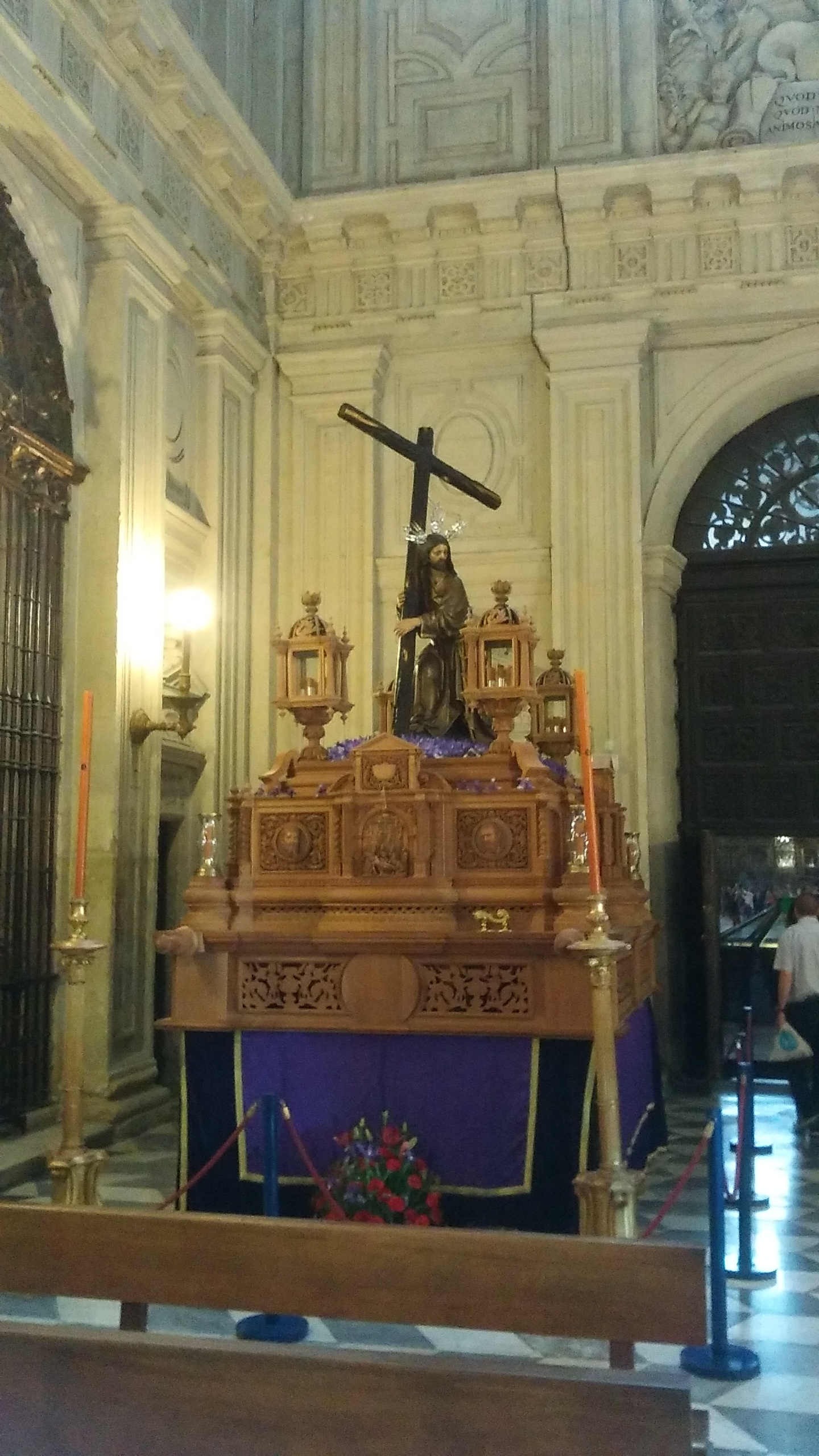 paso del Cristo de La Corona en Sevilla